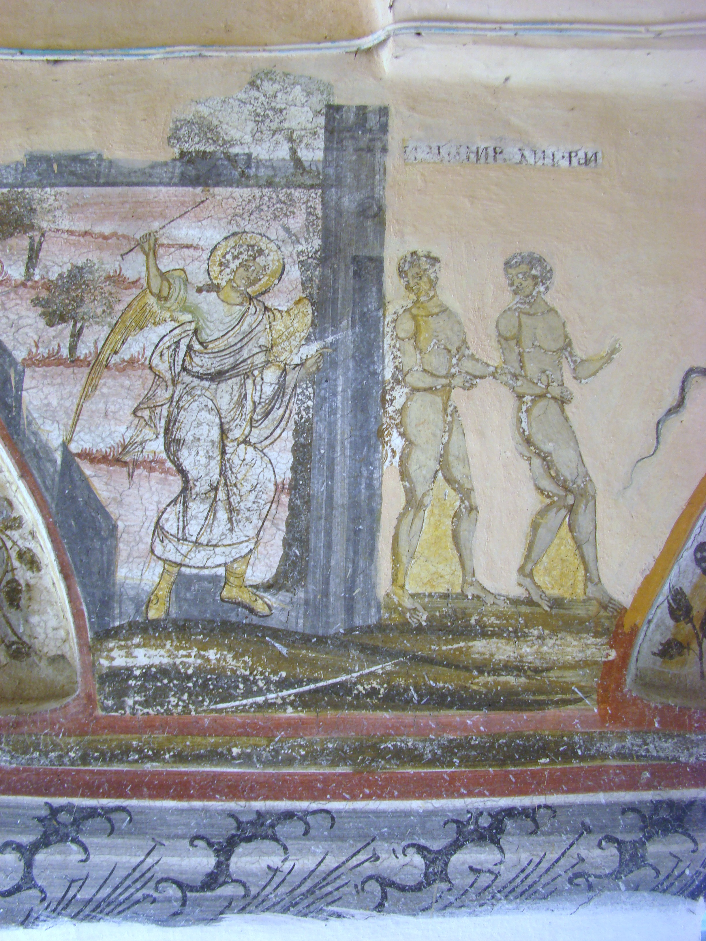 Biserica „Toți Sfinții” din Călugăreasa, județul Gorj